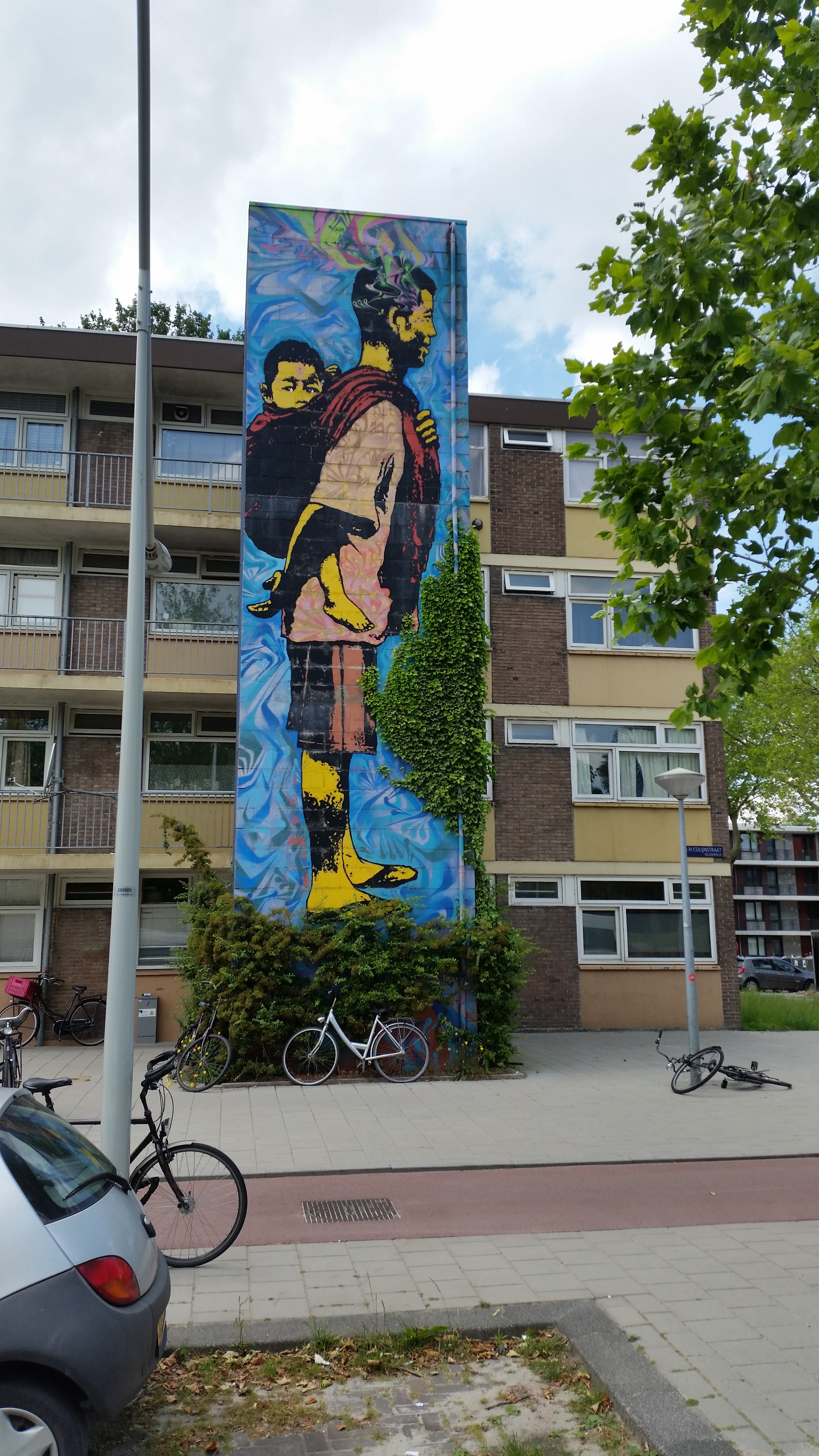 Muurschildering van Stinkfish (Dulce Hogar) in Amsterdam Nieuw-West, Dr. H. Colijnstraat (2015).